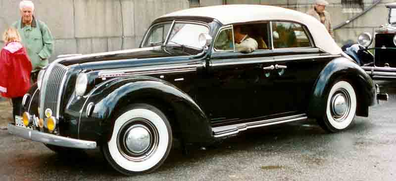 Opel Admiral AD 38 4-Door Cabriolet 1938